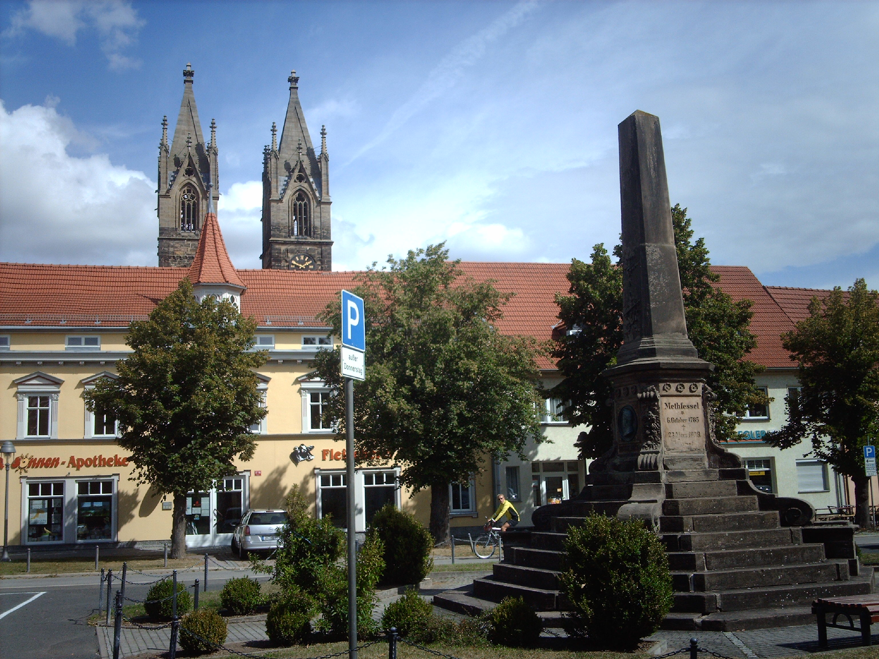 Obelisk am Marktplatz von Stadtilm (Deutschland) zu Ehren von Methfessel und Pfarrkirche im HintergrundEsperanto: Obelisko sur la centra placo de Stadtilm (Germanio) omaĝe al Methfessel kun la turoj de la paroĥa preĝejo fone.